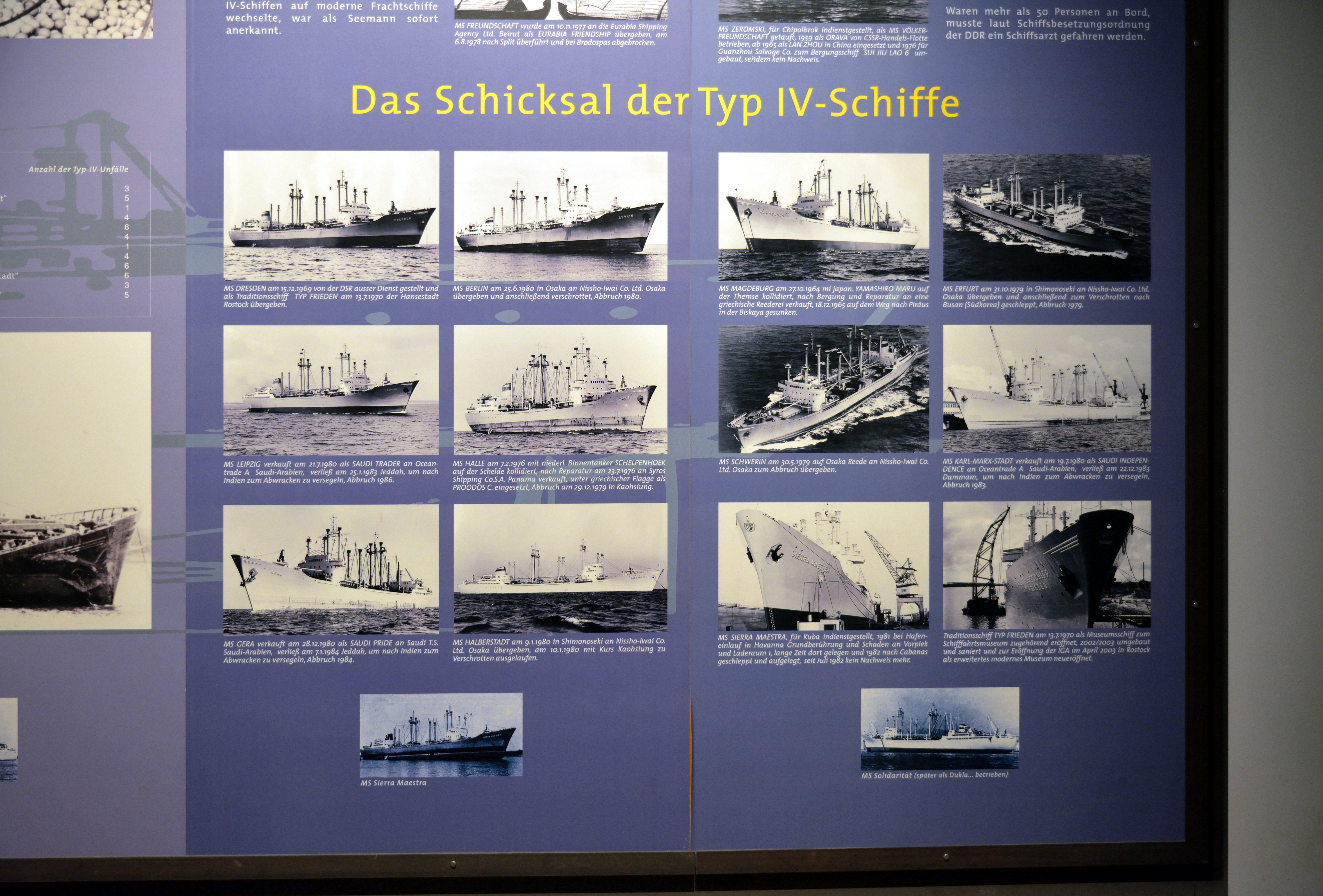 Ein Besuch auf dem Museumsschiff "Dresden" in Rostock im August 2019